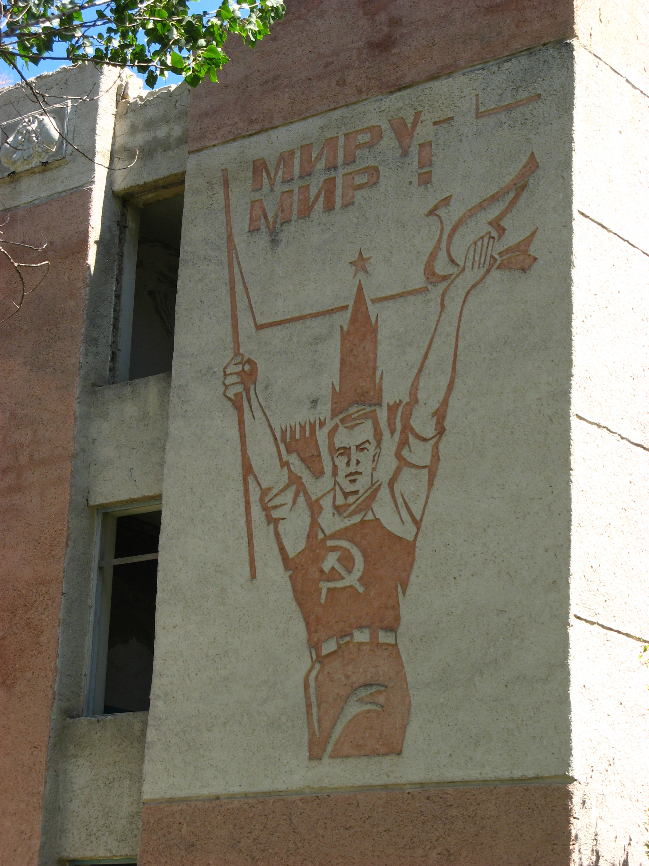 Amintiri din epoca sovietică...